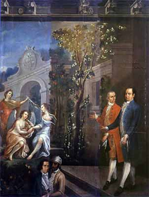 El Huerto, pintura de Miguel Jerónimo Zendejas